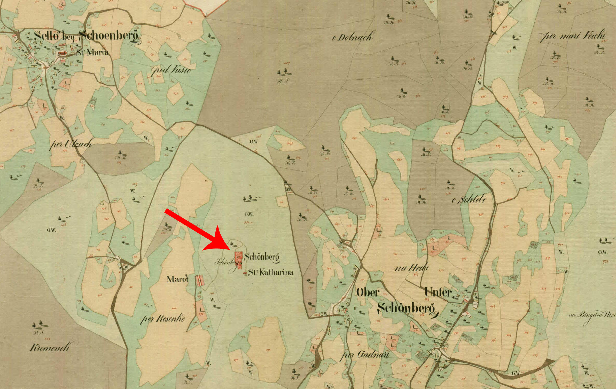 Franciscejski kataster za Kranjsko, 1823-1869